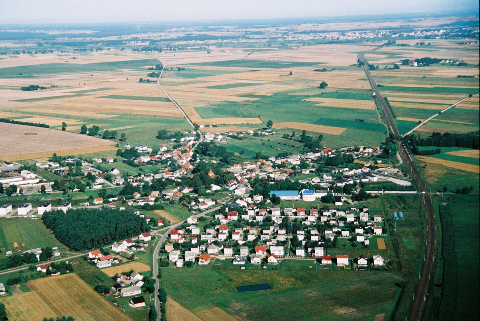 Panorama Narzymia